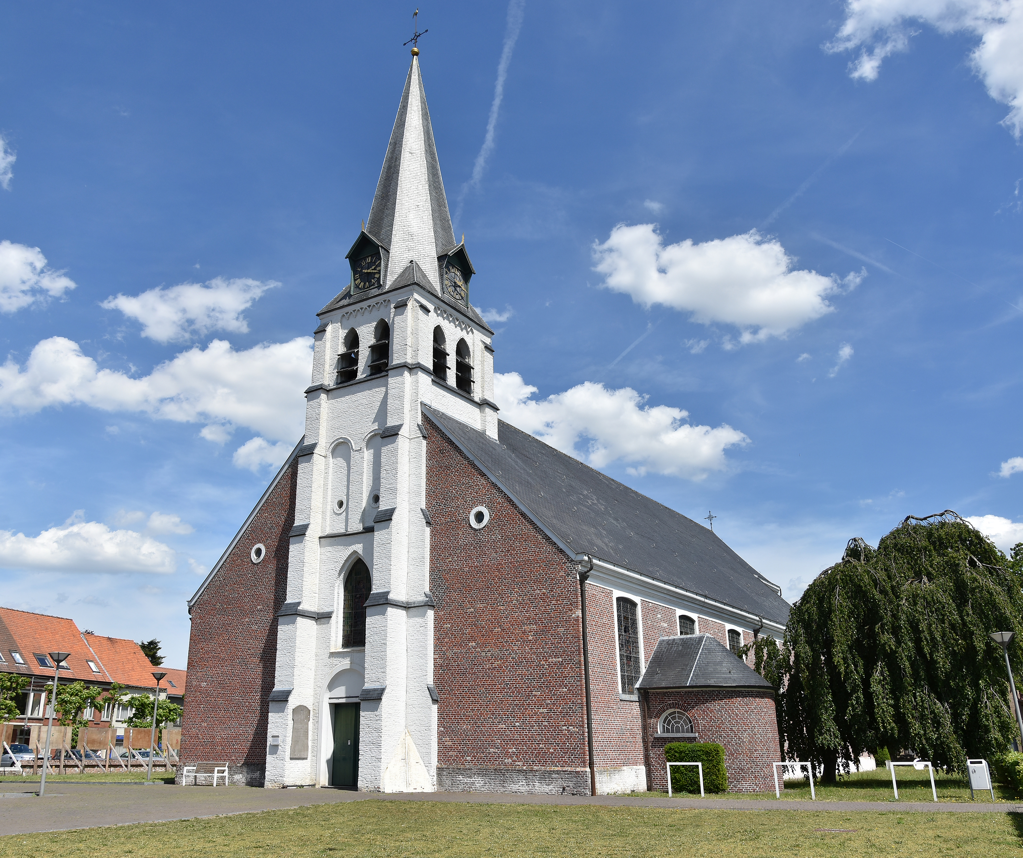 Sint-Gilliskerk (Lembeke) (44646) 2-06-2019 14-18-28